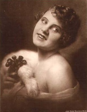 Die Schauspielerin Ossi Oswalda (1897-1947) auf einer Fotografie von Nicola Perscheid.